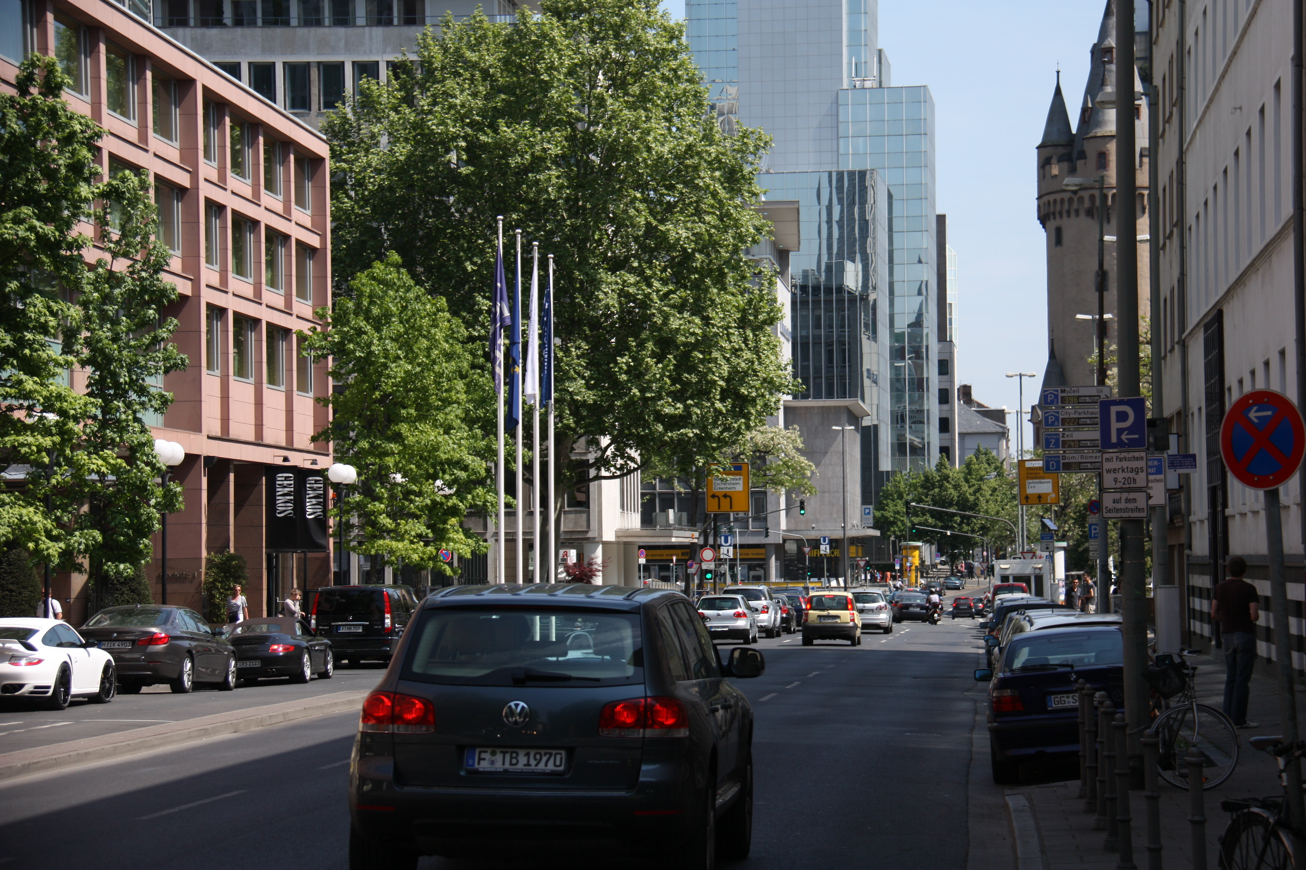 Die Hochstraße ist Teil des inneren "Anlagenrings" von Frankfurt und verbindet den Opernplatz mit dem Eschenheimer Turm, einem mittelalterlichen Stadttor und Verkehrsknotenpunkt, welcher im Hintergrund zu erkennen ist.